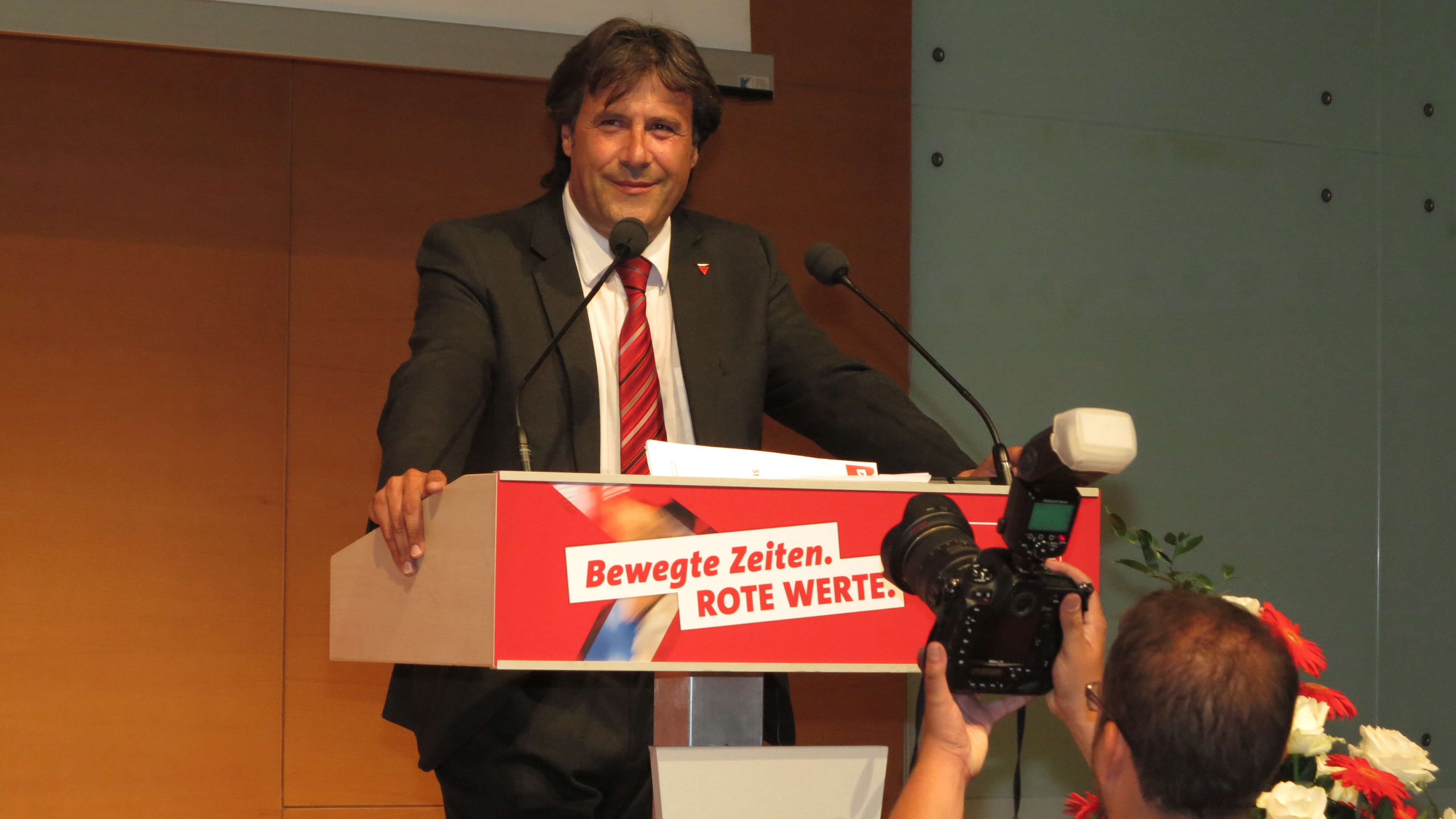 Ingo Mayr - SPÖ-Landesparteitag Tirol 2014